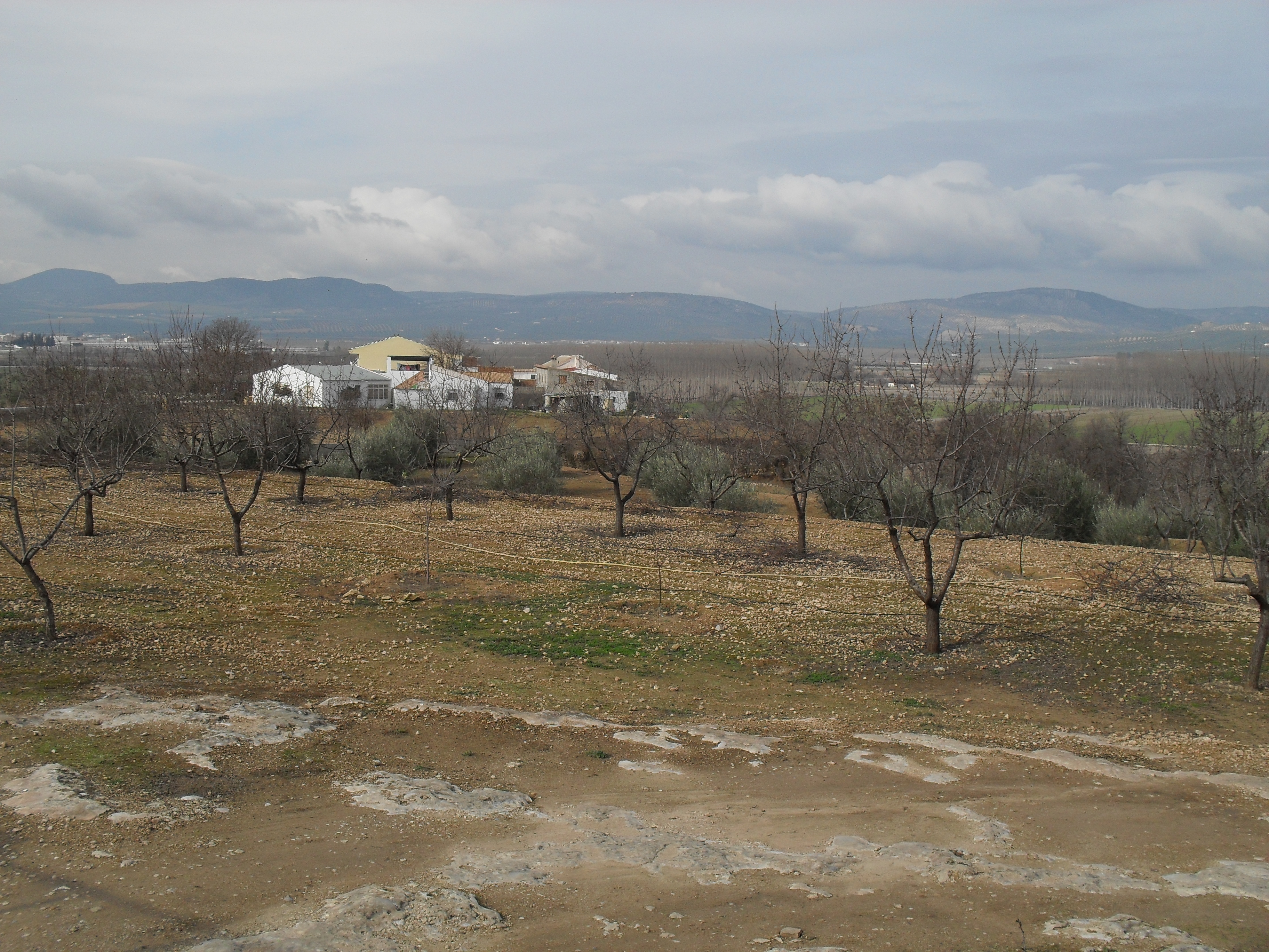 Vista de la Casería de Las Torres en su entorno natural.